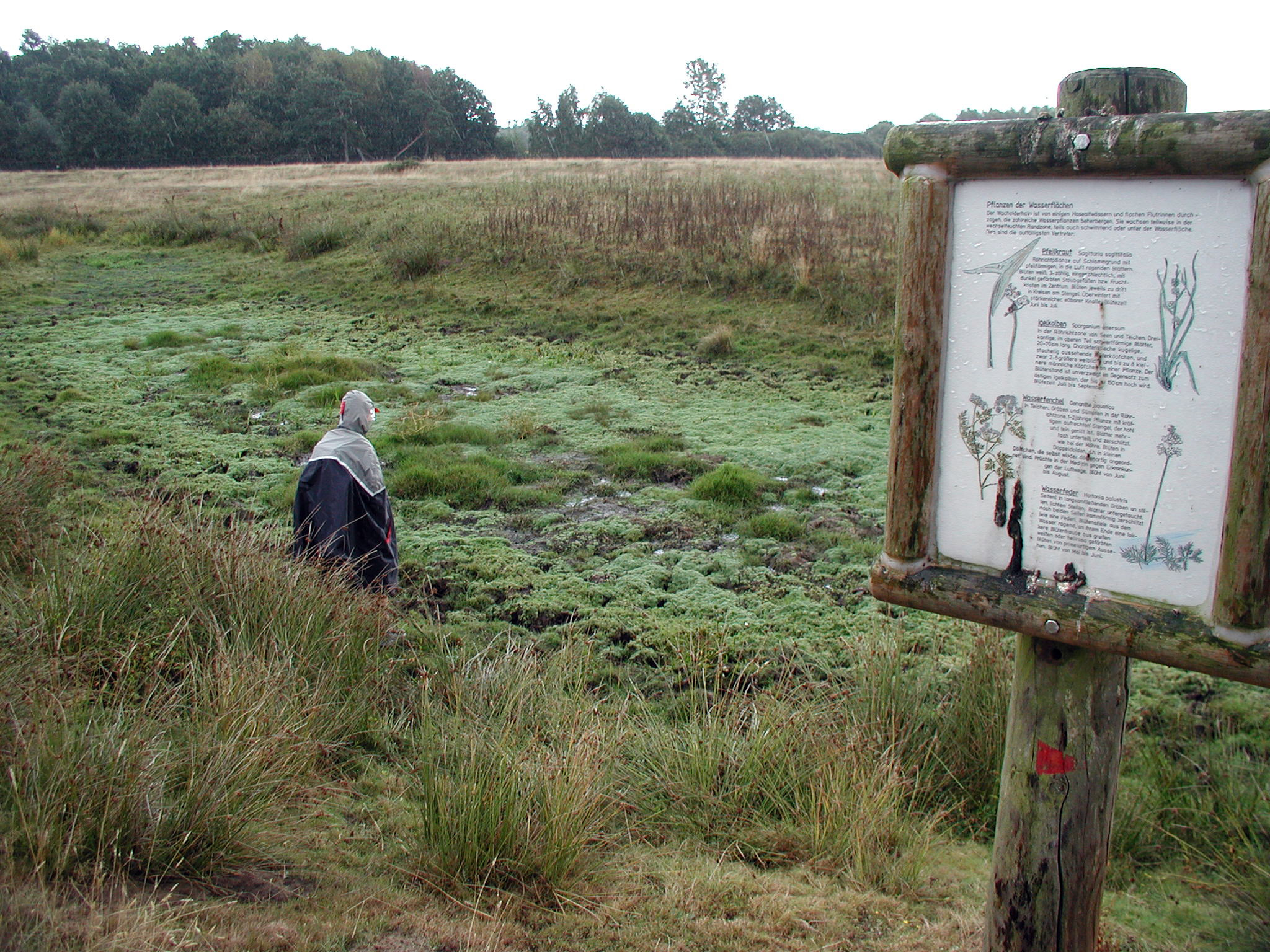 Haselünner Wacholderhain, Emsland